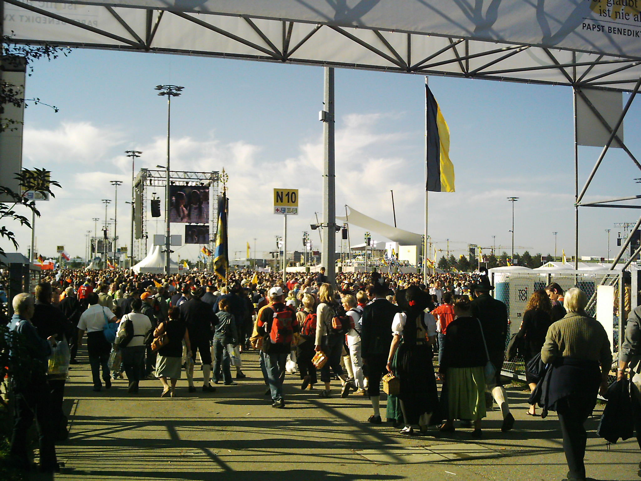 Papst Benedikt XVI. in München-Riem, altes Flughafengelände, heute Messegelände